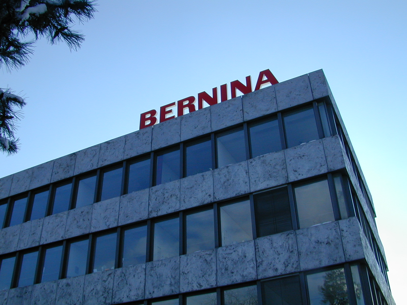 BERNINA Verwaltungsgebäude in Steckborn